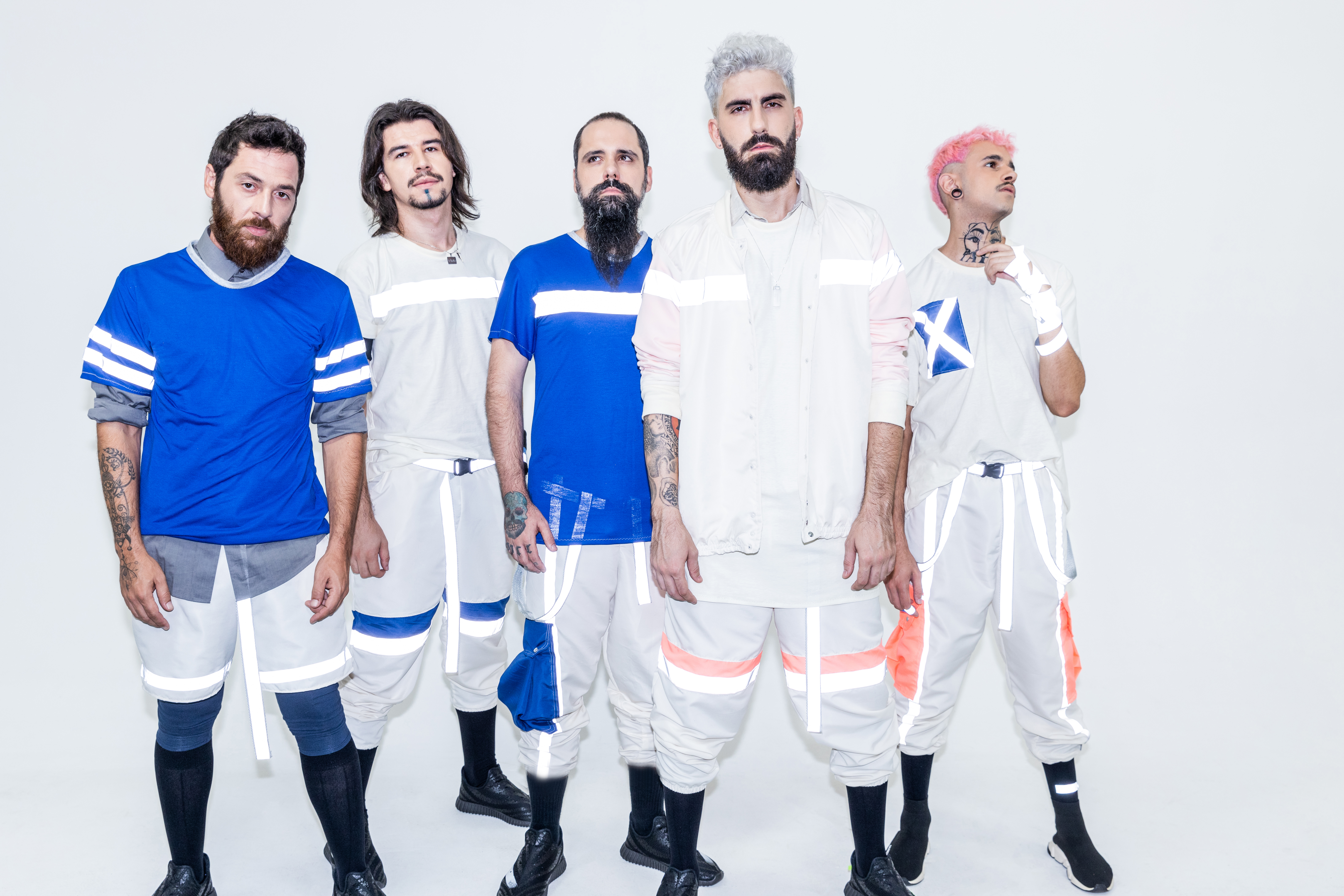 NDK em divulgação do disco "O Selenita". Foto de Renan Facciolo